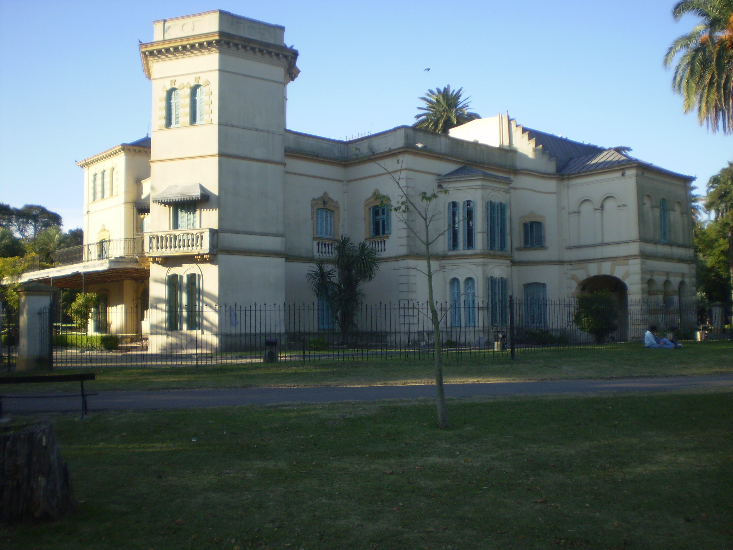 Casona de los Olivera (vista posterior). Parque Avellaneda, Buenos Aires